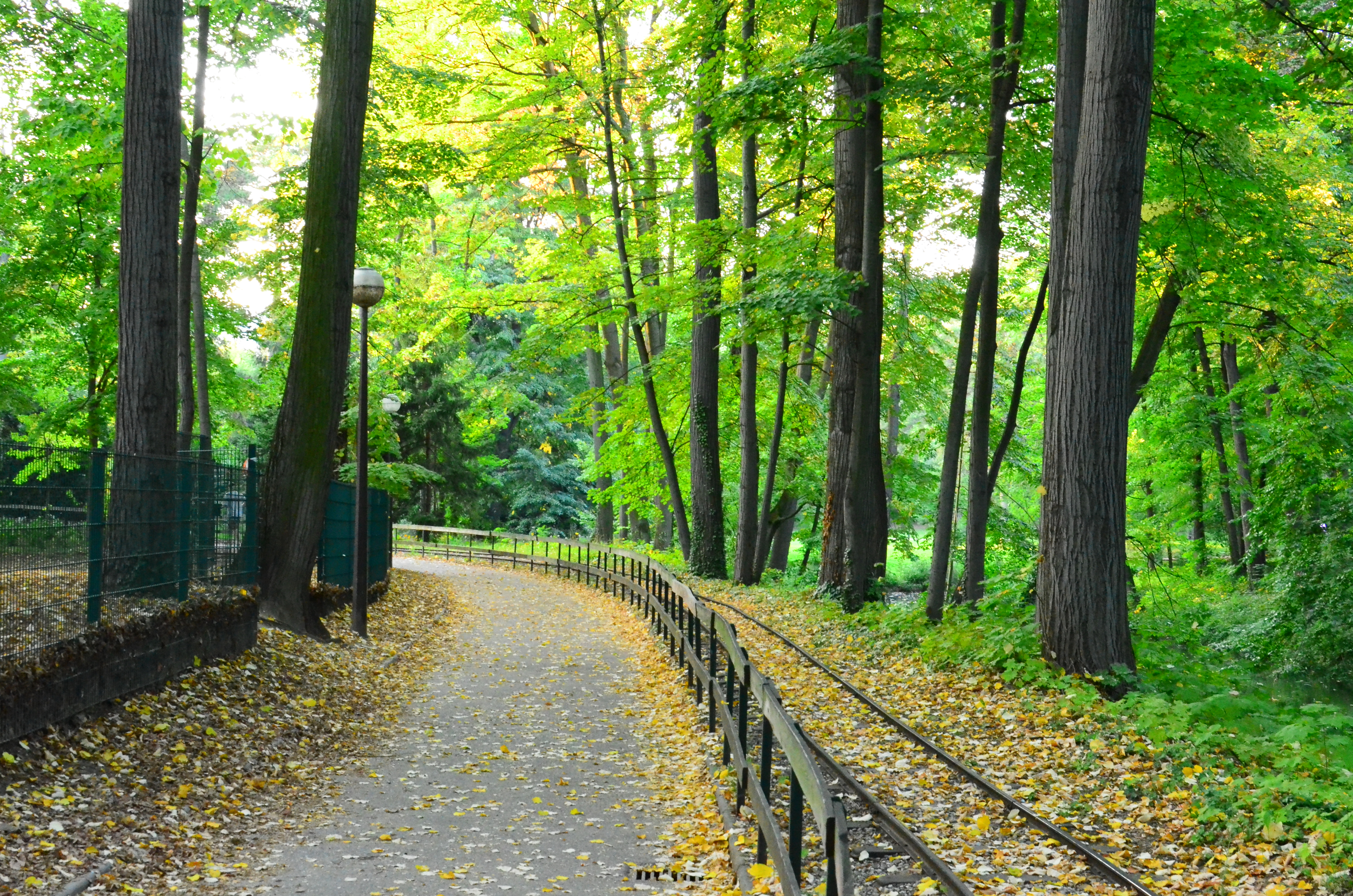 Parc de la Tête d'Or de Lyon - Allée de Belle Vue